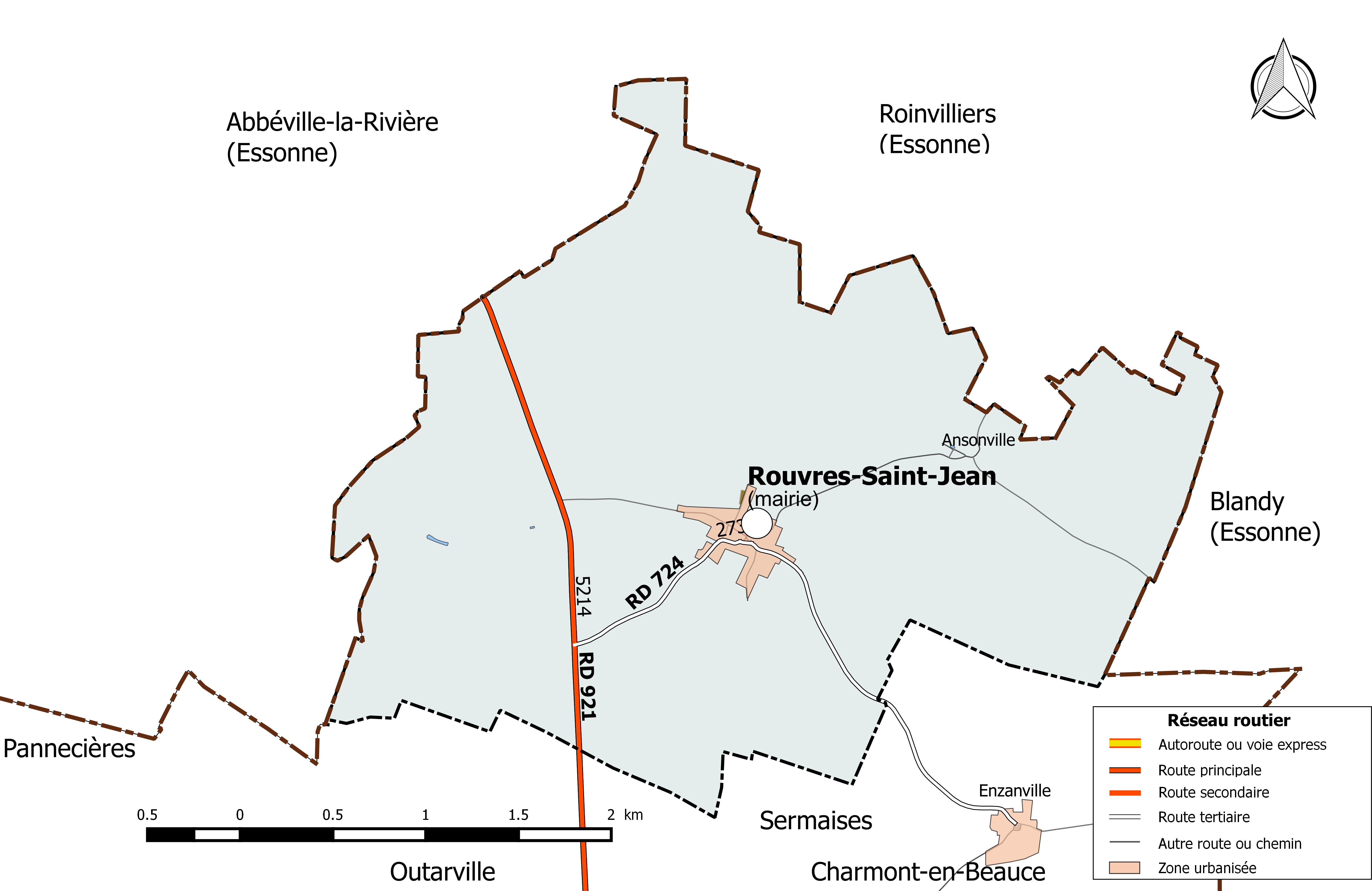 Carte du réseau routier de la commune de Rouvres-Saint-Jean.